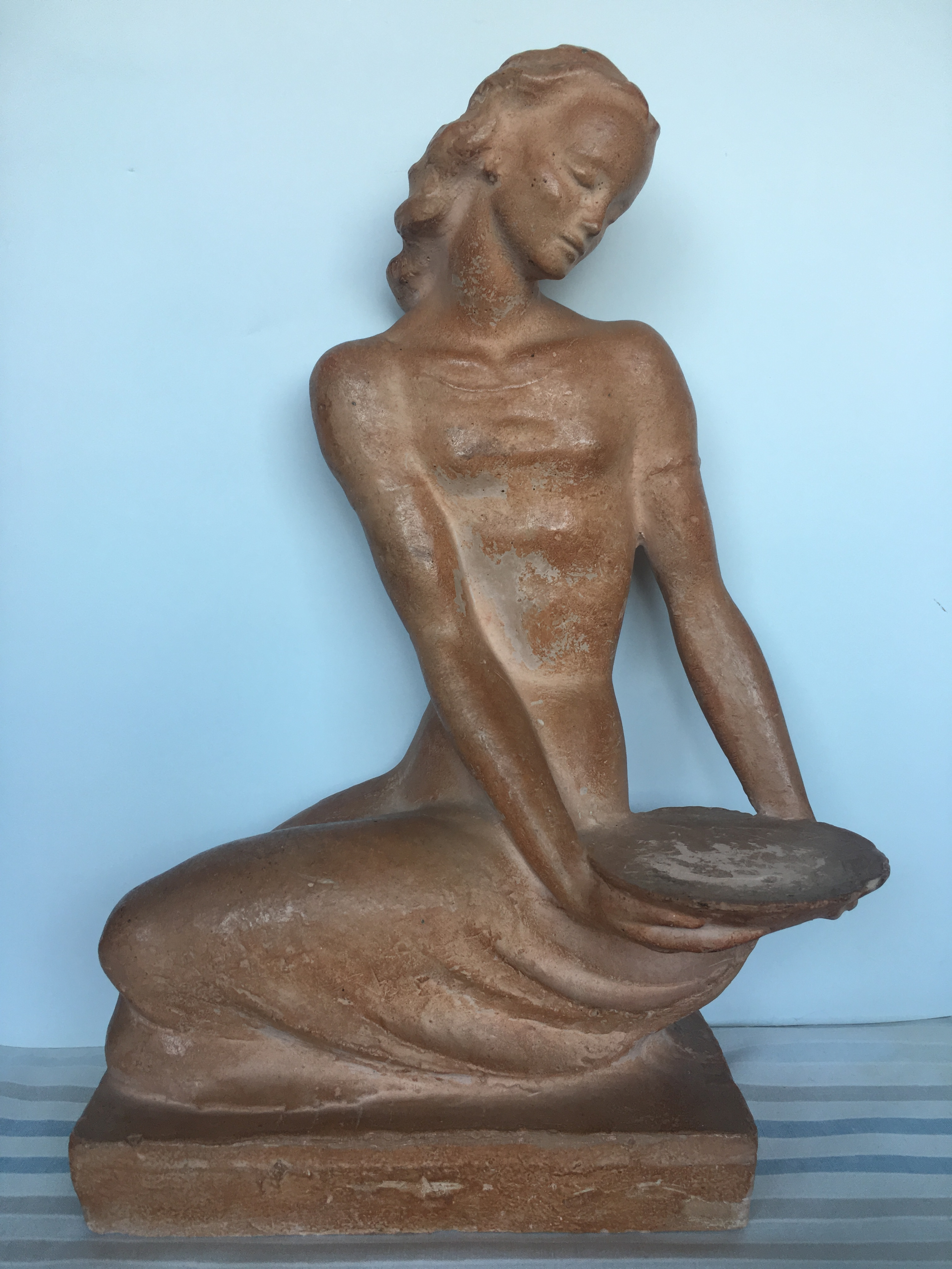 Photo eines Modells in EigenbesitzBobrifax (talk) 13:57, 15 May 2019 (UTC)